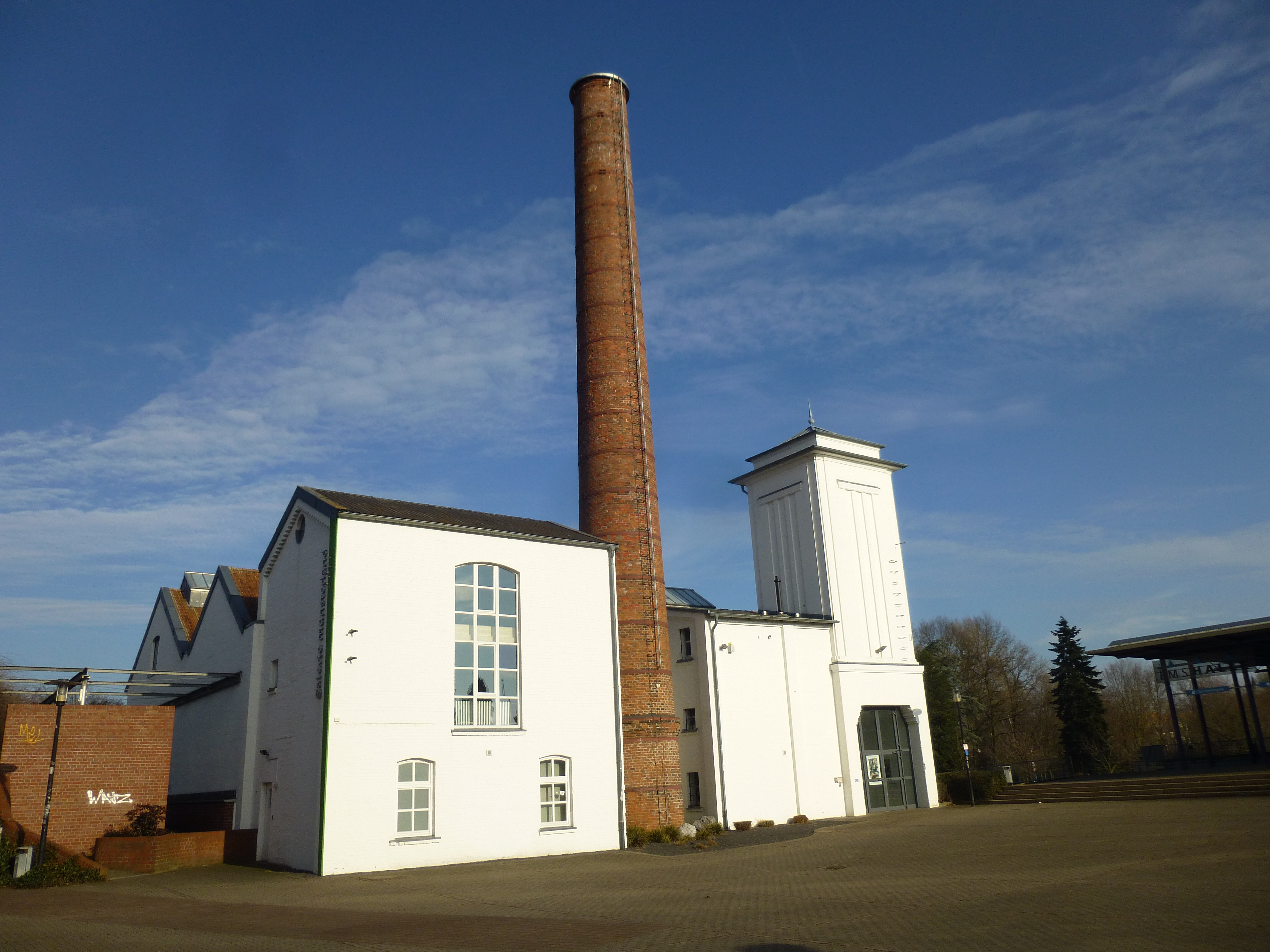 Kesselhaus, Schornstein, Maschinenhaus und Wasserturm der ehemaligen Weberei Stroetmann, Emsdetten. Seit 1990 befindet sich hier die Galerie Münsterland.